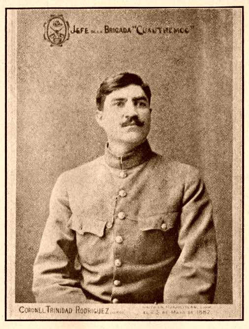 General Trinidad Rodríguez